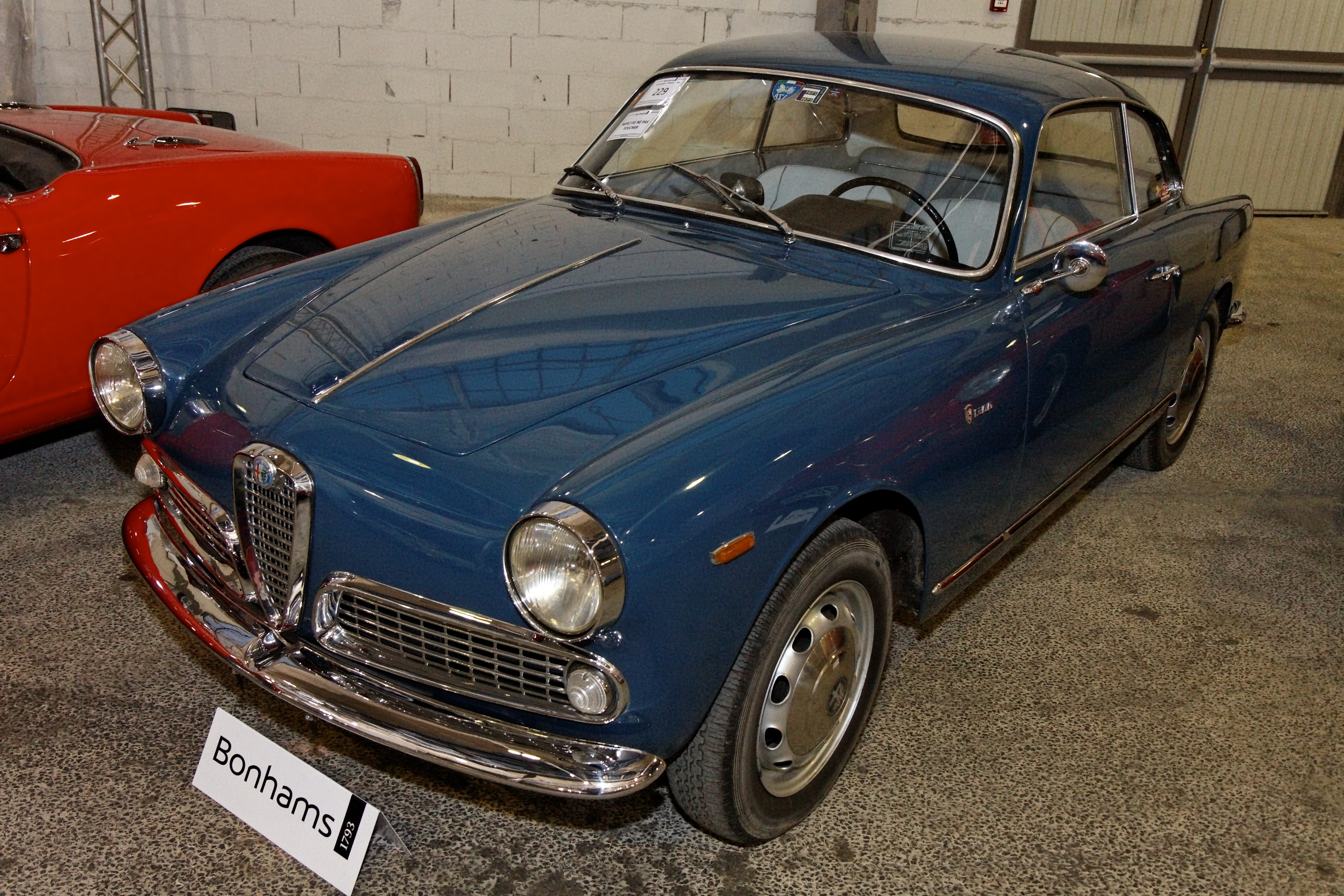 Alfa Romeo Giulietta Sprint Coupé